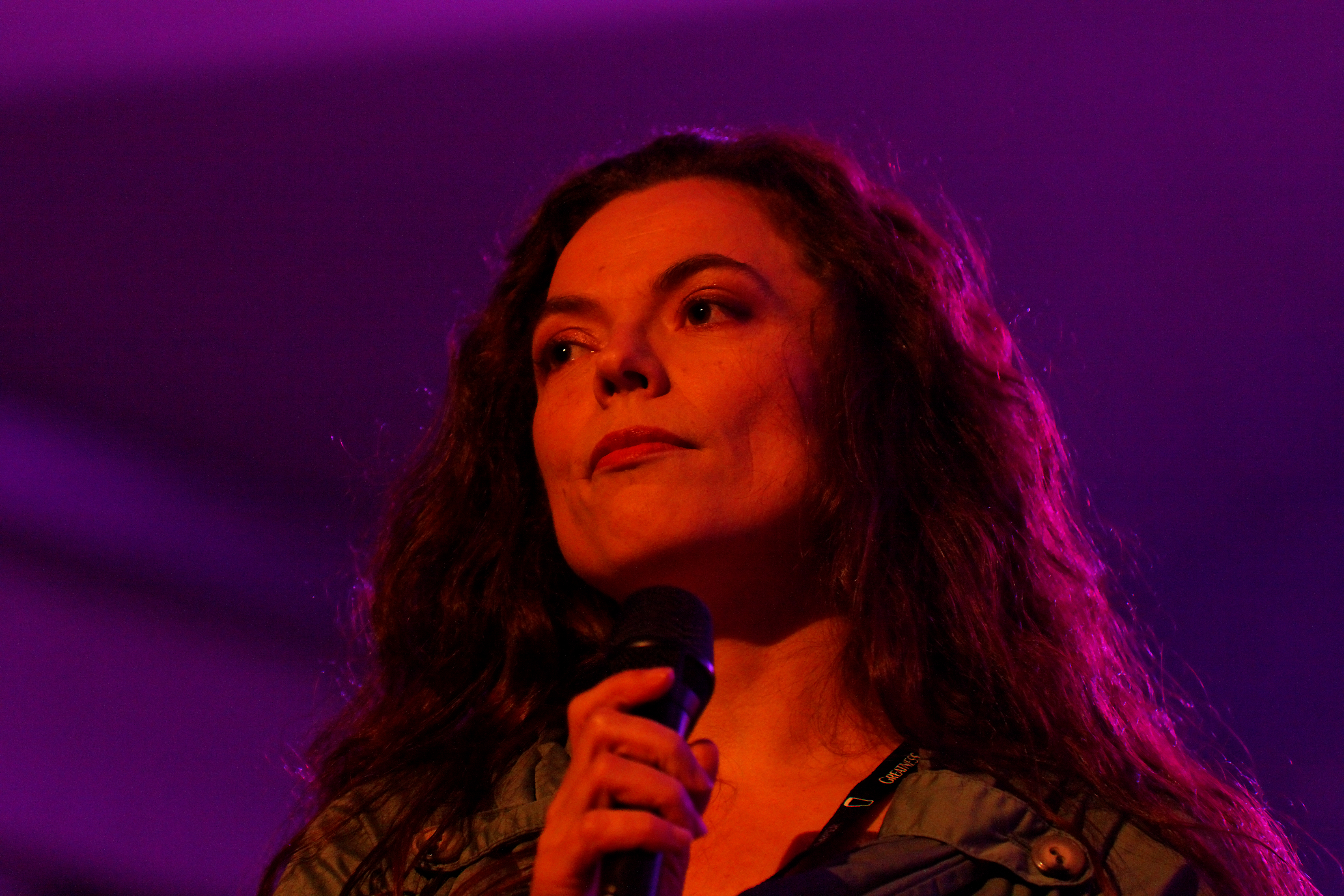 Gilles le Bigot Group en concert le 19 juillet lors du festival de Cornouaille 2011.